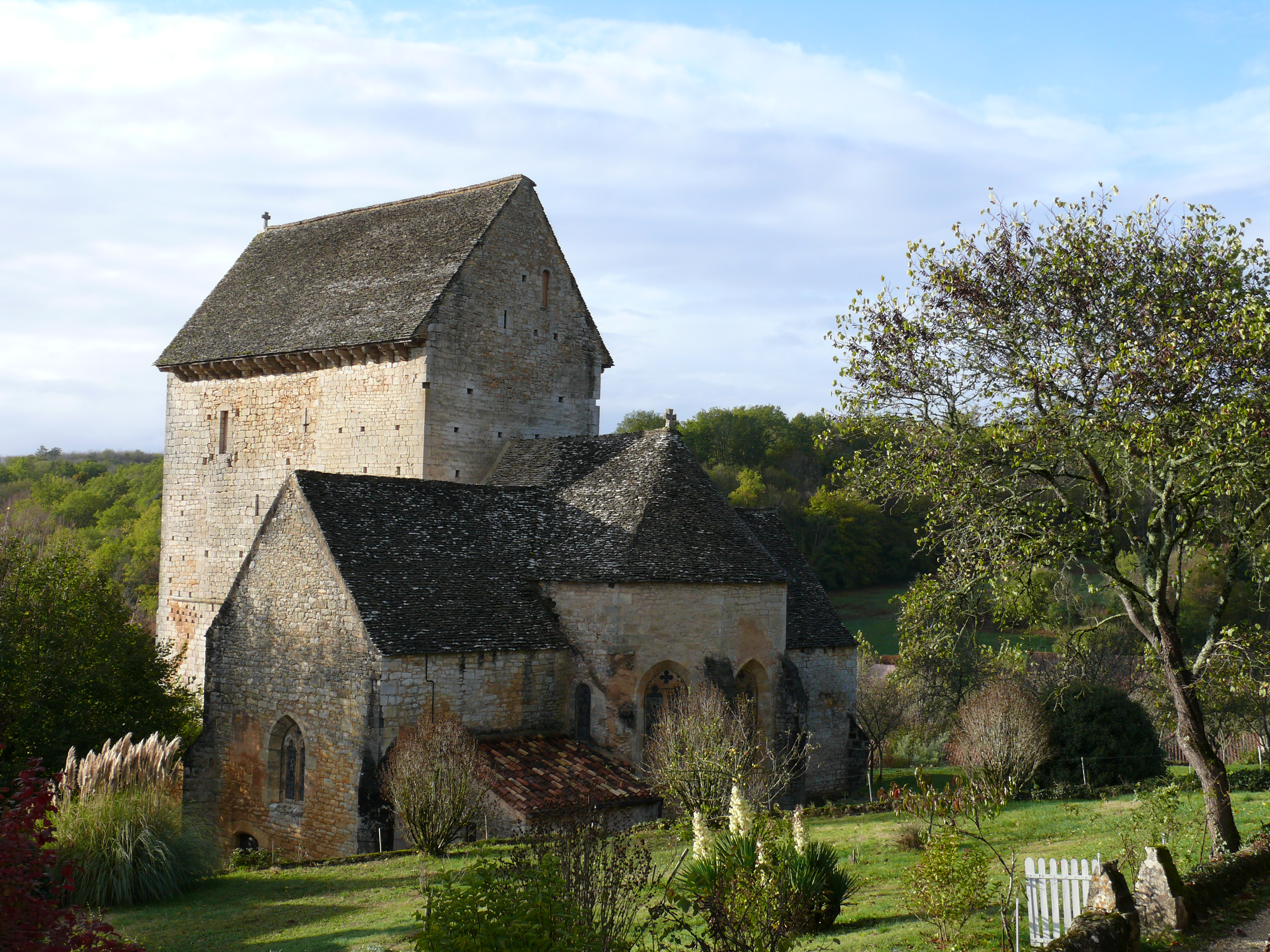 Besse - Eglise Saint-Martin